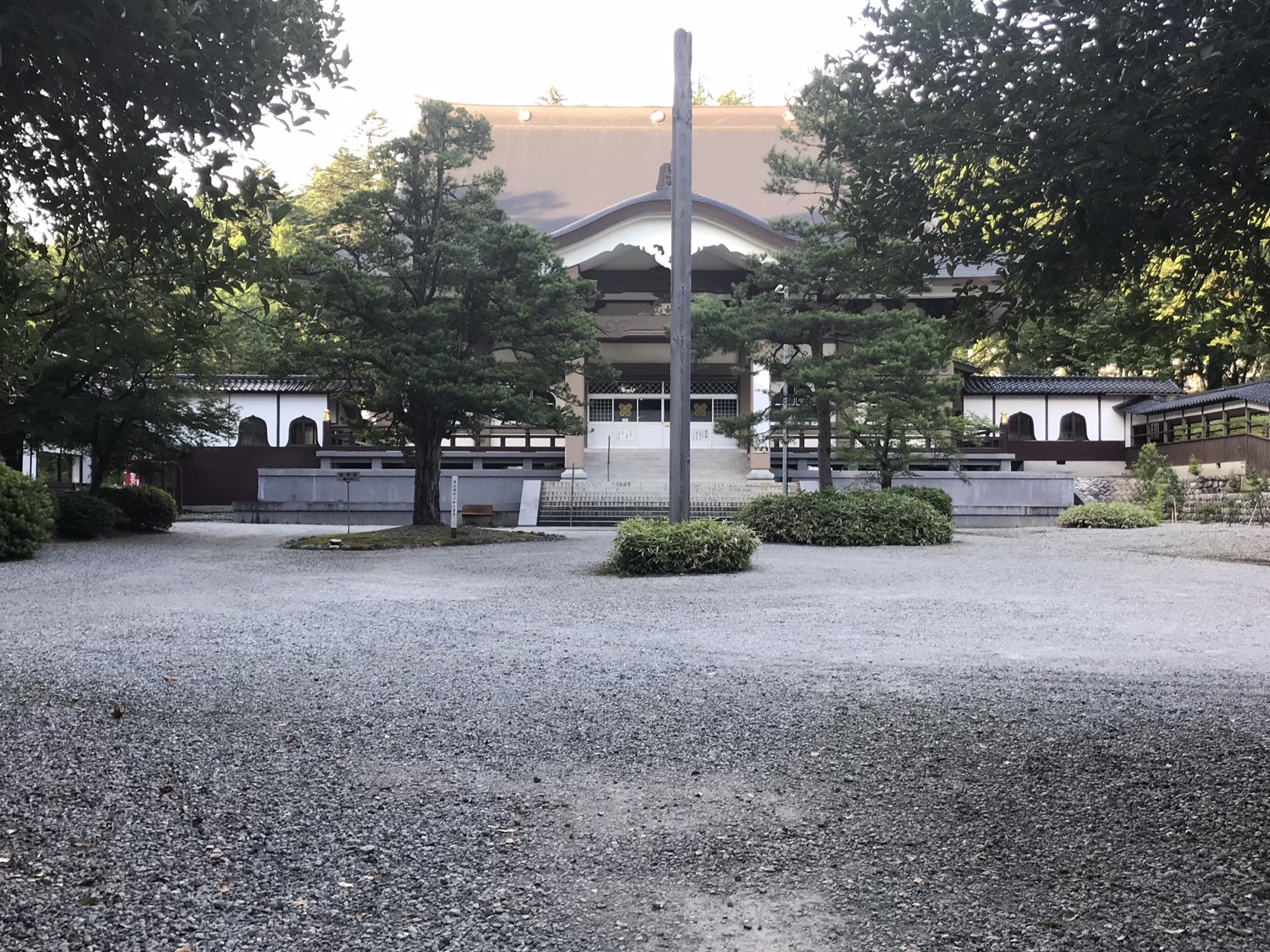 りゅうせんじ